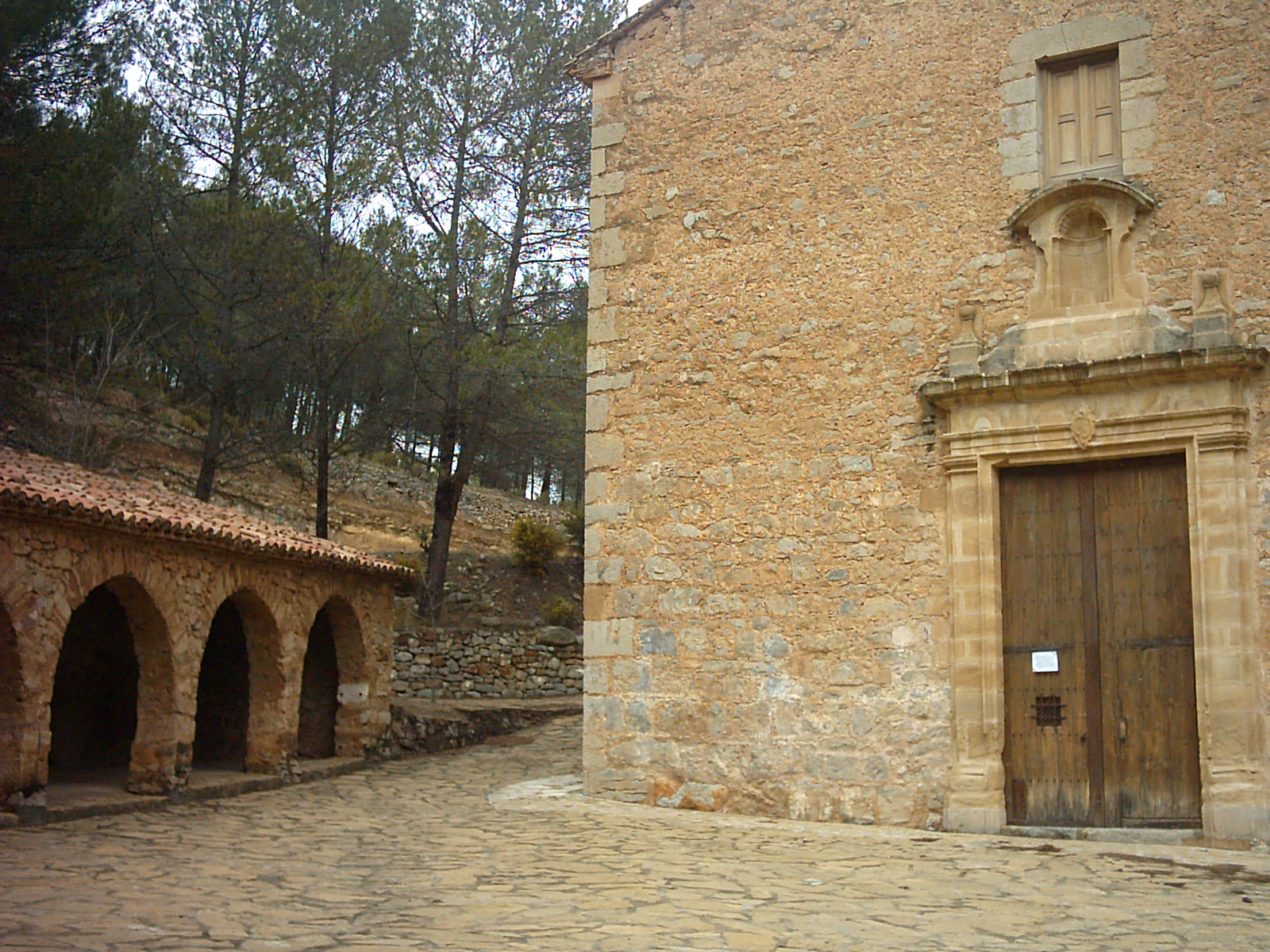 Ermita de Santa Anna (Sucaina) 08.142-003.